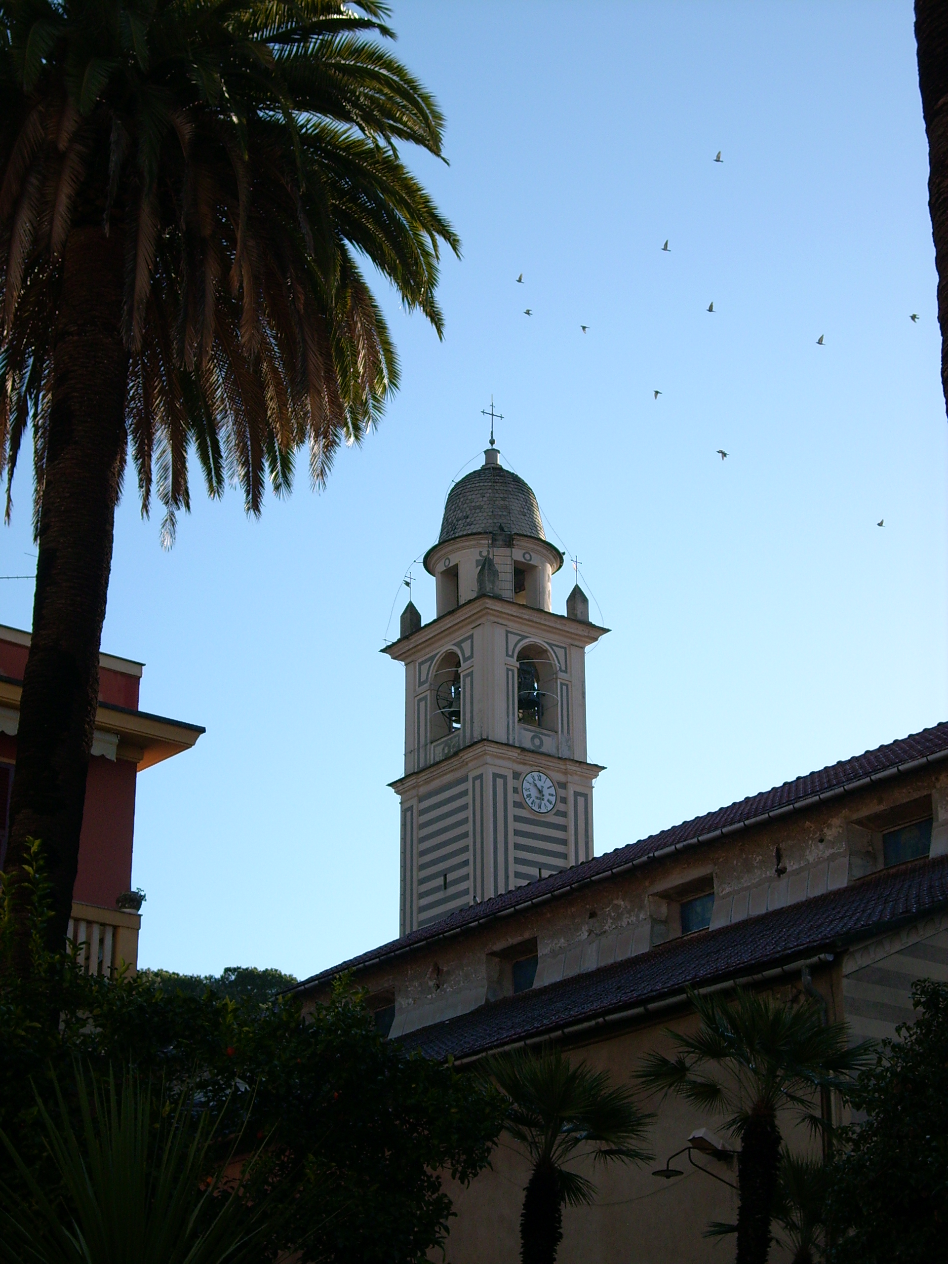 Campanile della chiesa di San Francesco, Rapallo, Liguria, Italy